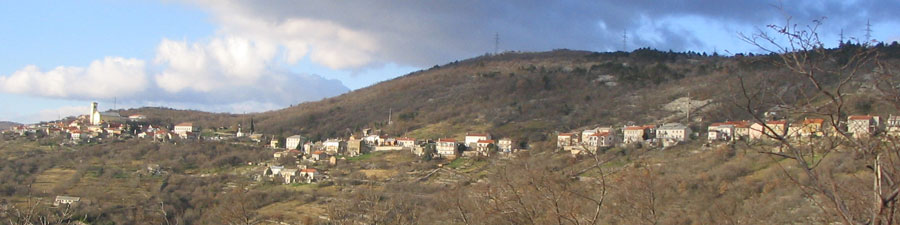 Praputnjak, near Bakar, Croatia